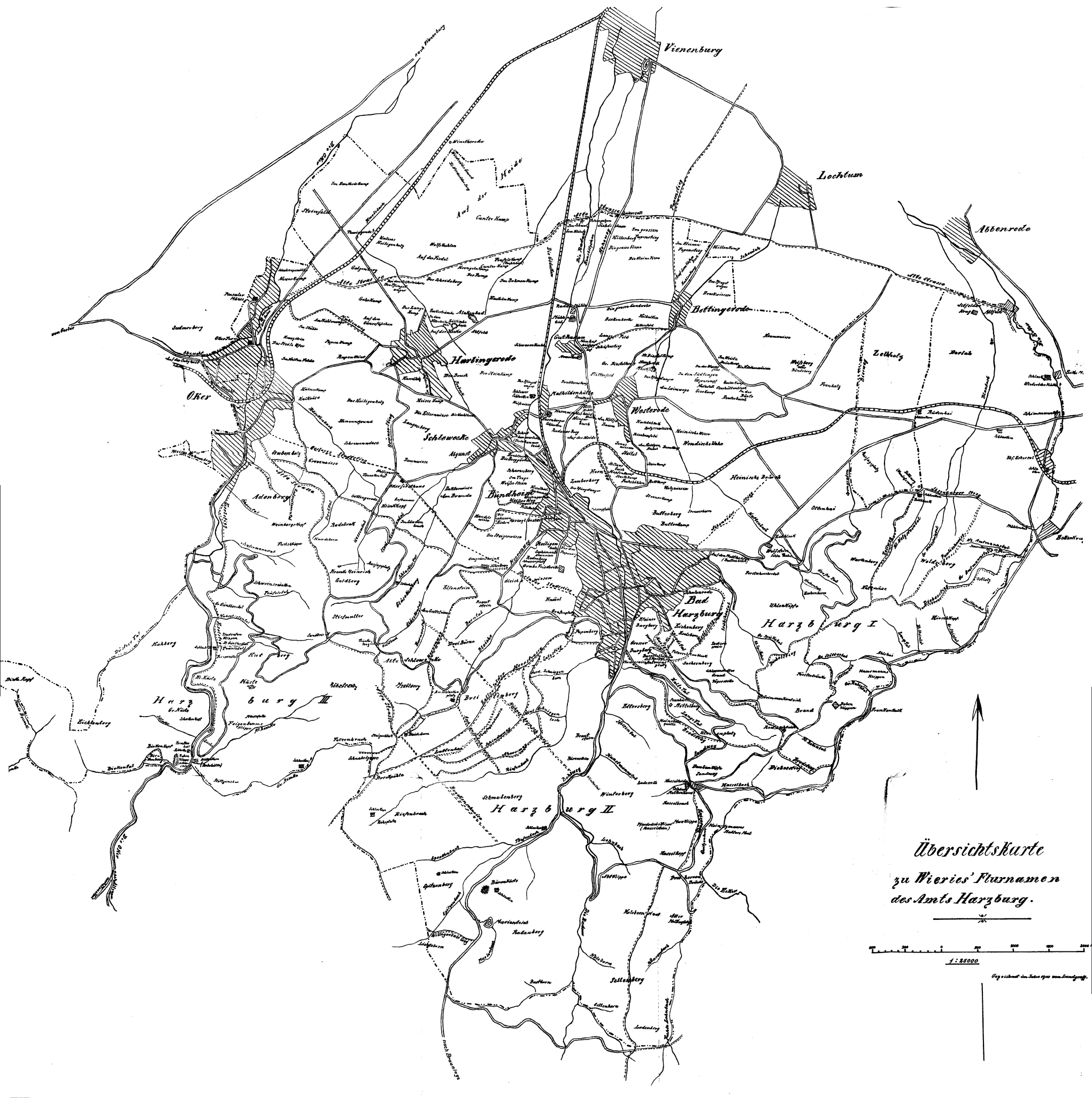 Link